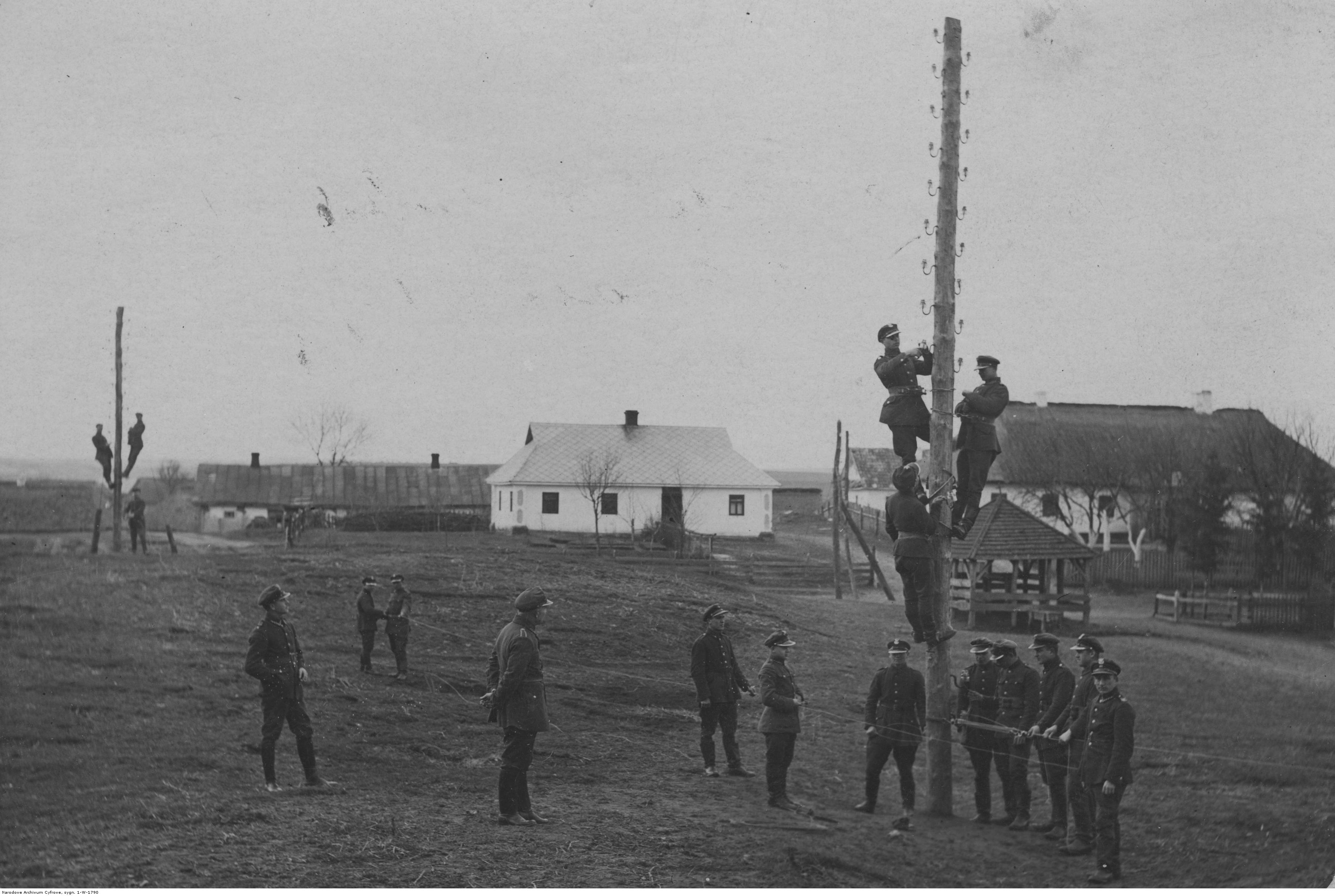 Zakładanie linii telefonicznej w 4 Batalionie Korpusu Ochrony Pogranicza "Dederkały". Żołnierze na słupach przygotowują zaczepy na kabel telefoniczny, trzymany przez żołnierzy na ziemi. Koncern Ilustrowany Kurier Codzienny - Archiwum Ilustracji. Sygnatura: 1-W-1790